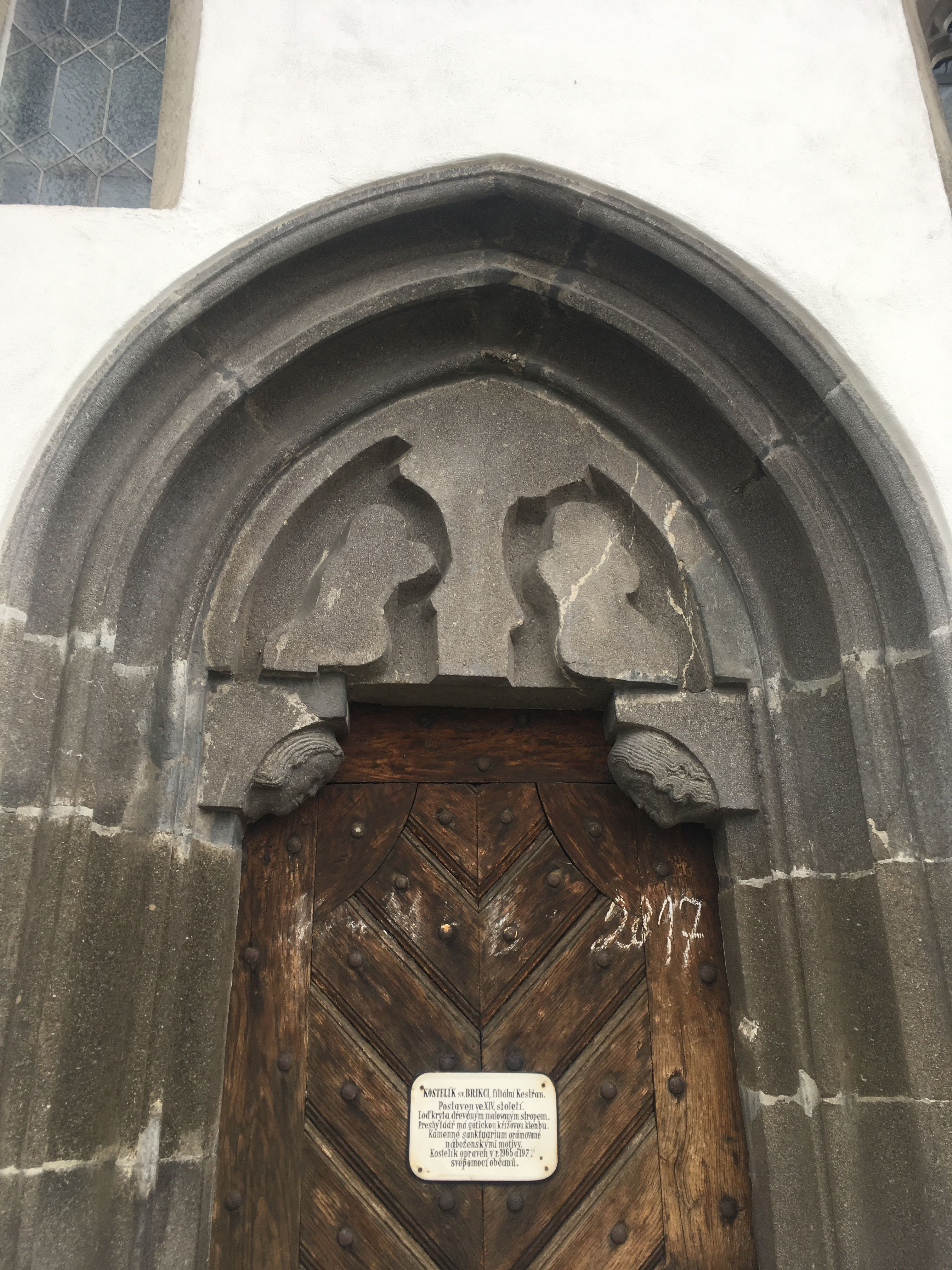 vstup